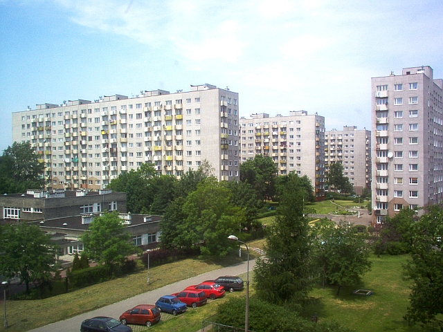 Osiedle Staszica w katowickiej dzielnicy Giszowiec. Fot. Paweł Grzywocz